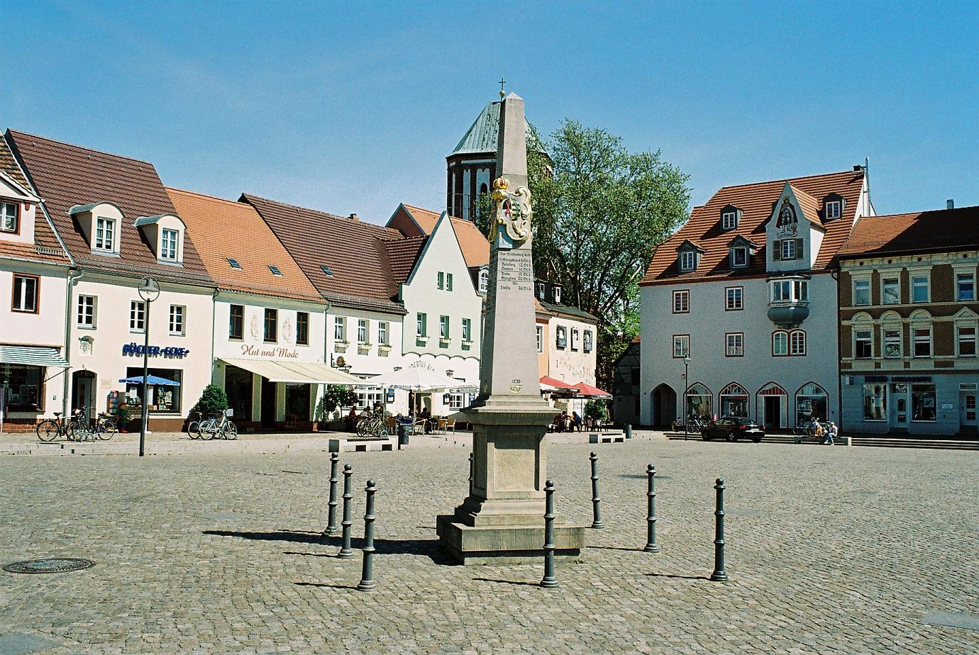 Senftenberg, Markt mit Kursächsischer Postmeilensäule, Blick zur Kirche